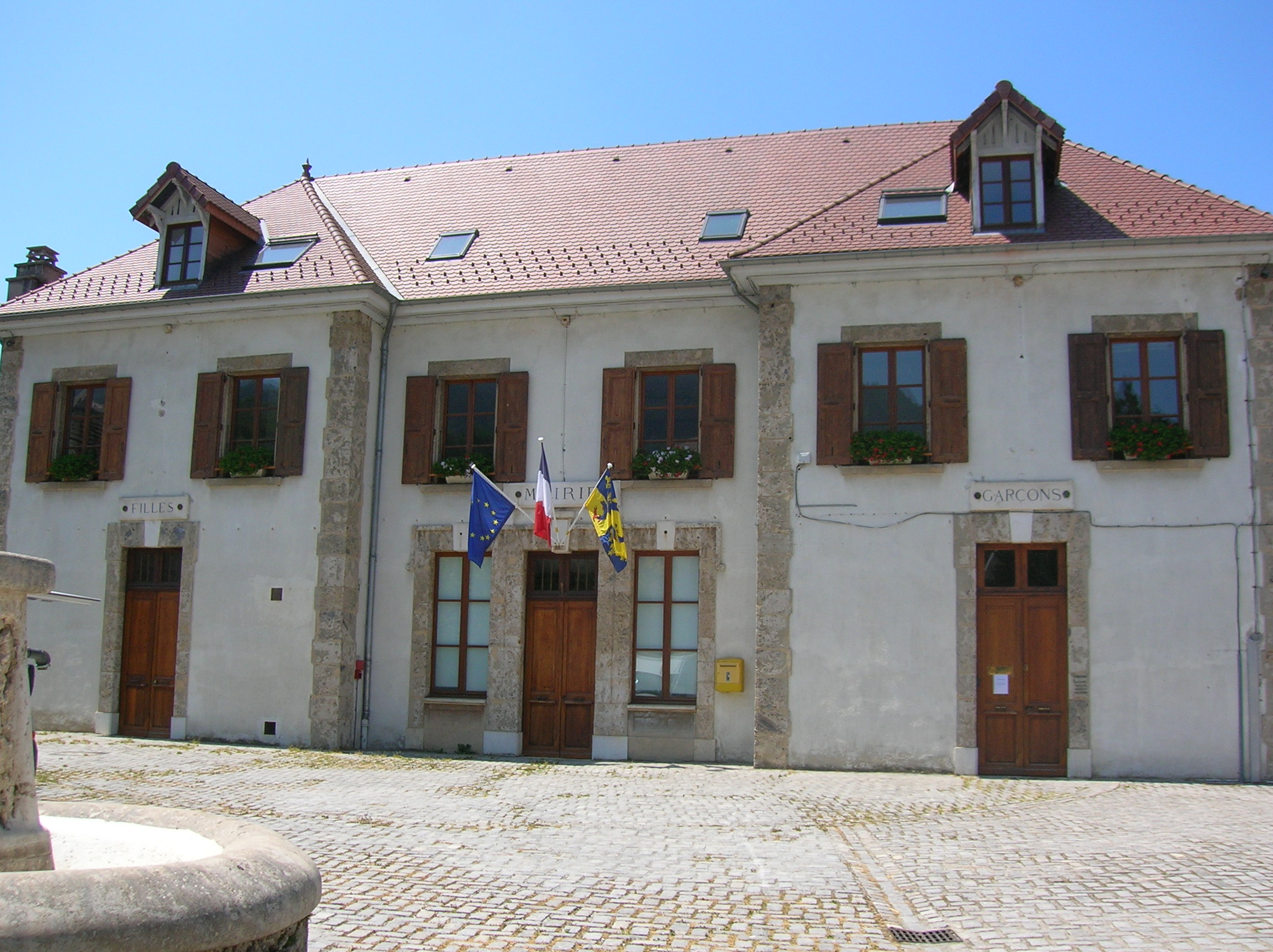 Revel (Isère) mairie et anciennes écoles